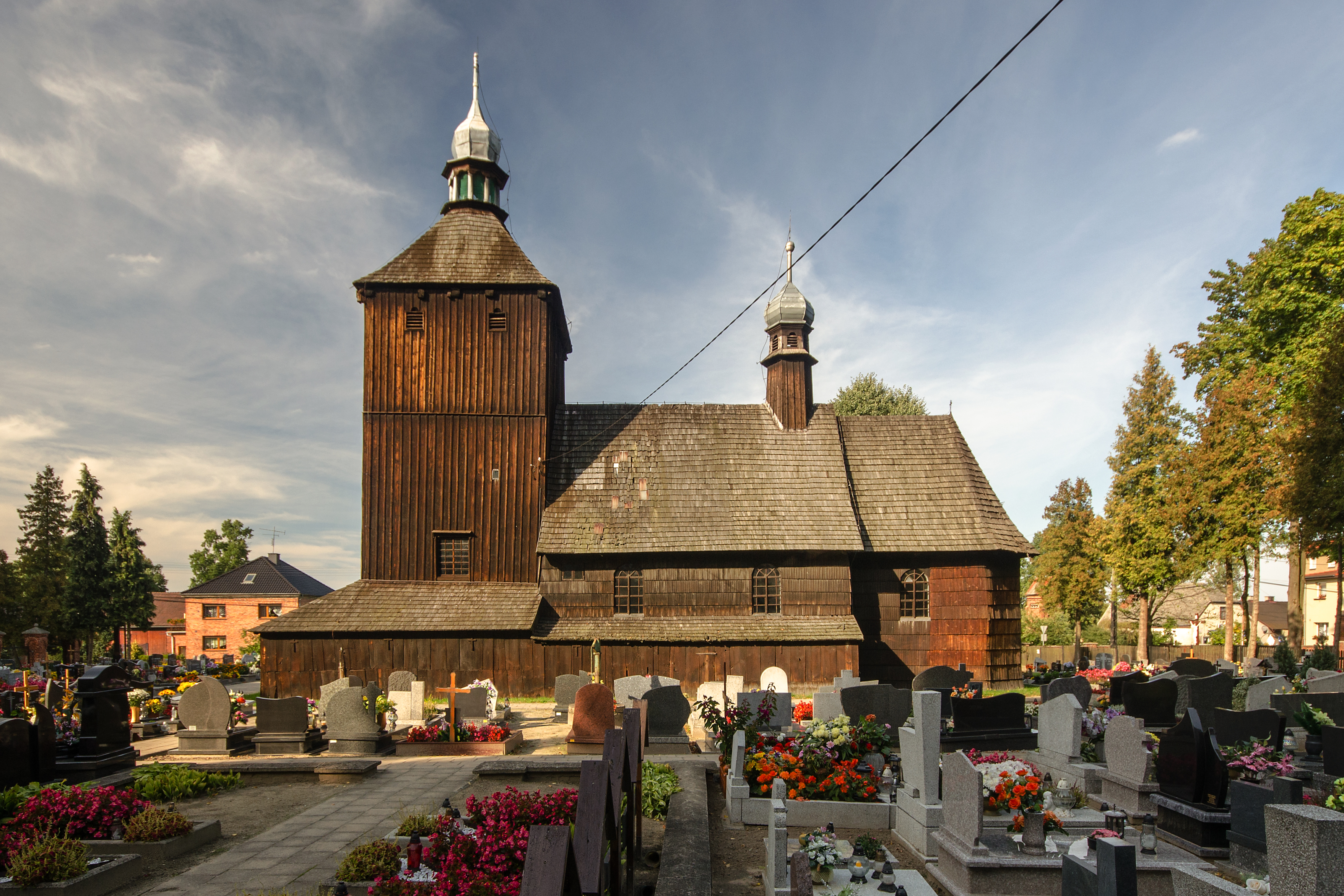 Borki Wielkie, kościół cmentarny pw. św. Marcina i św. Bartłomieja, 1697